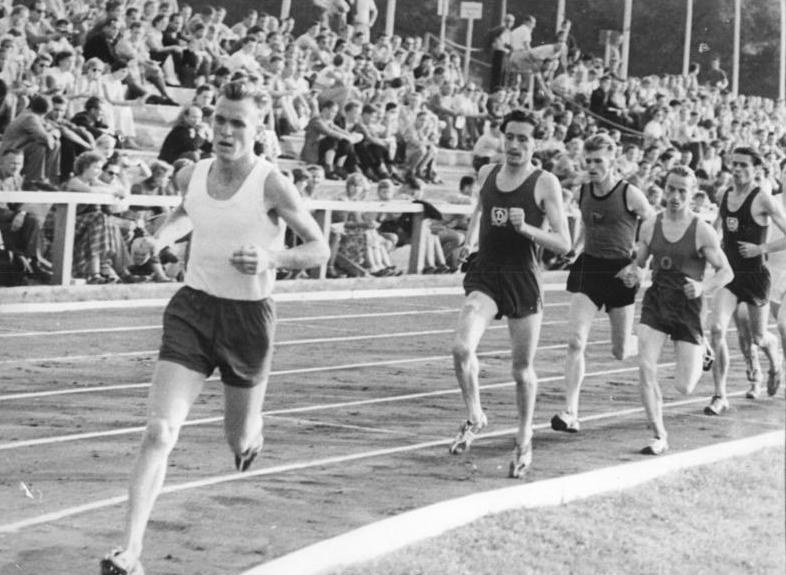 Klaus Porbadnik Zentralbild TBD-Wehse 4.9.1955 -3134- VI. DDR-Leichtathletikmeisterschaften in Jena Im Jenaer Ernst-Abbe-Stadion fanden in der Zeit vom 2. bis 4. September 1955 die VI. Leichtathletikmeisterschaften der DDR statt. Die Titelkämpfe standen unter dem Zeichen der Vorbereitungen auf die Olympiade 1956 in Melbourne. UBz: Eine Szene aus dem 10.000-Meterlauf. Dritter von rechts der spätere Sieger Claus Probadnik, der für die Distanz 31:21,4 Min. benötigte.